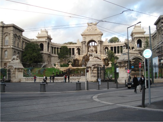 Дворецът Лоншан